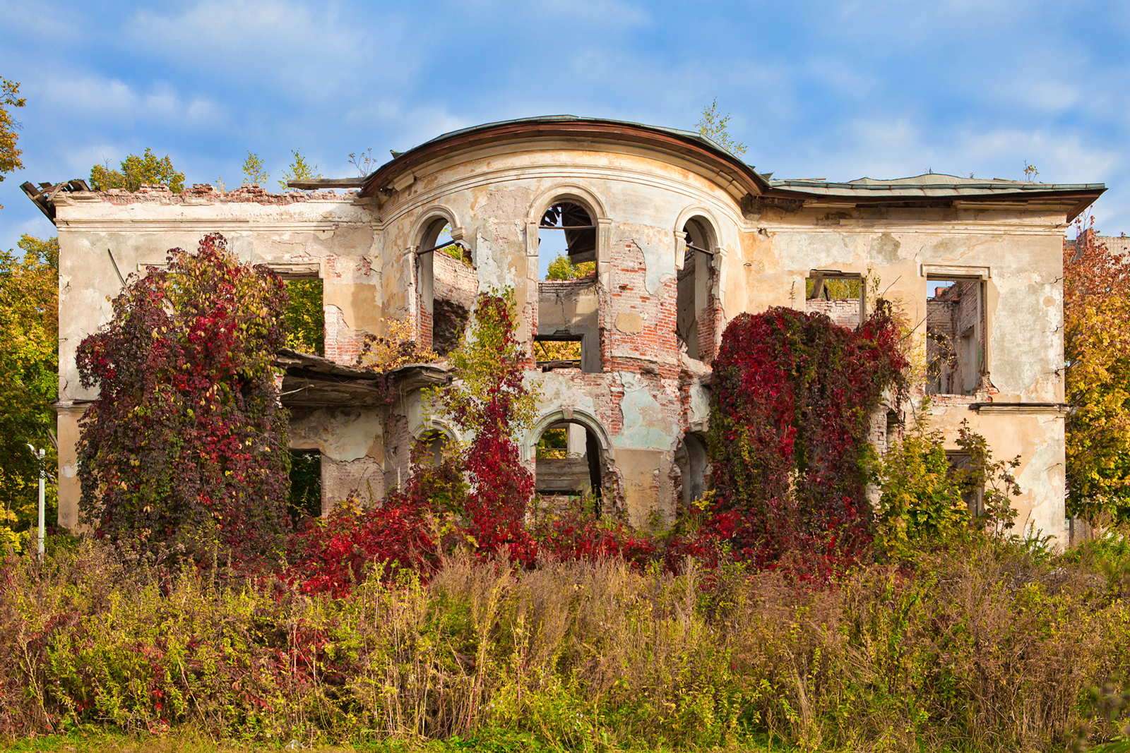 Усадьба Петровское: улица Чехова, 2-5, Алексин, Алексинский район, Тульская область